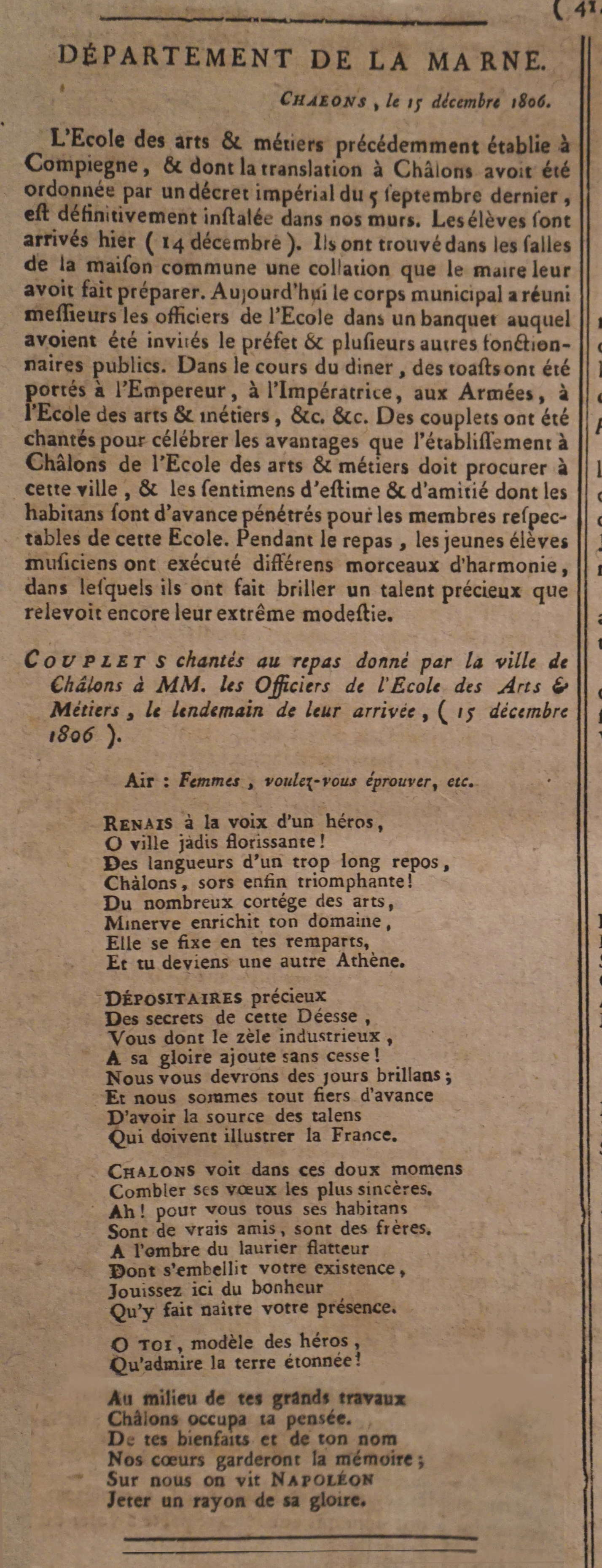 installation en 1806, les affiches de la marne.